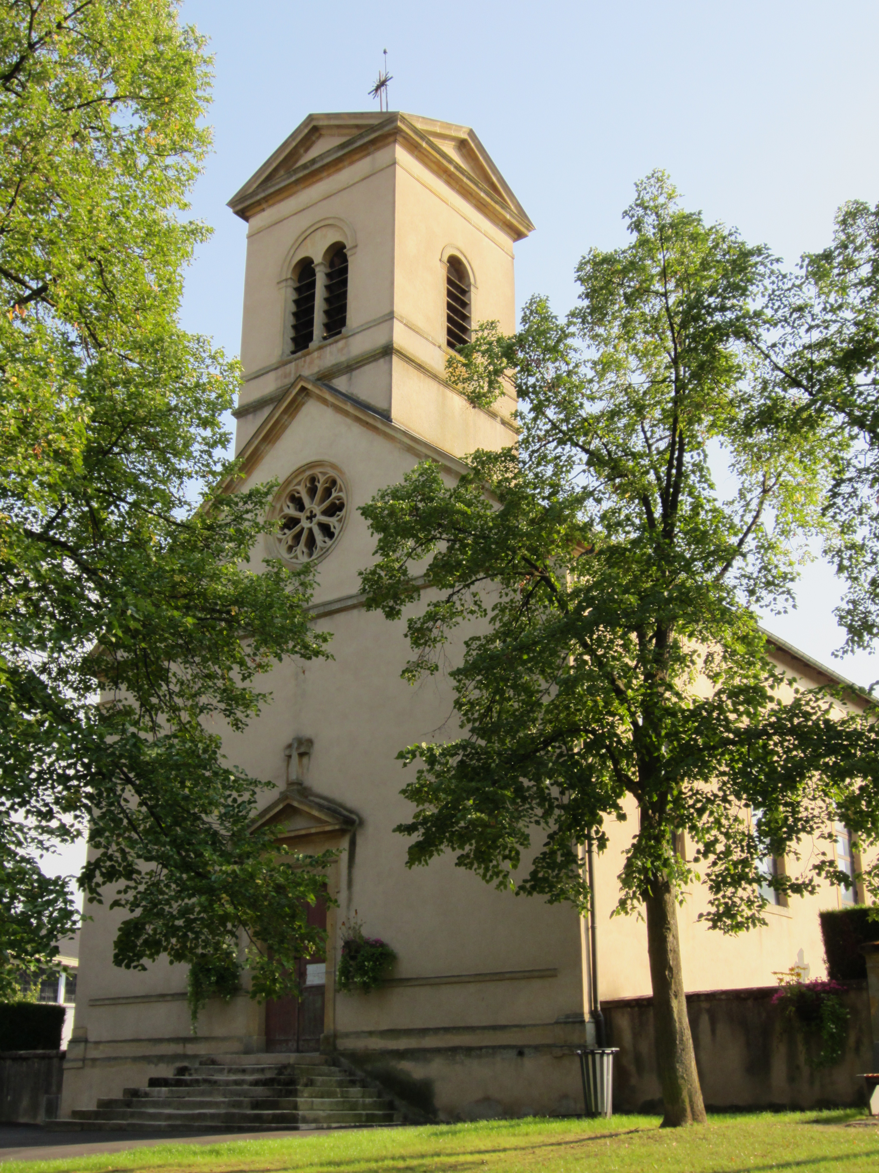 Description eglise sainte Ursule haute yutz Date26 August 2011Sourcemon appareil photoAuthorAimelaimePermission (Reusing this file) eglise sainte Ursule haute yutz